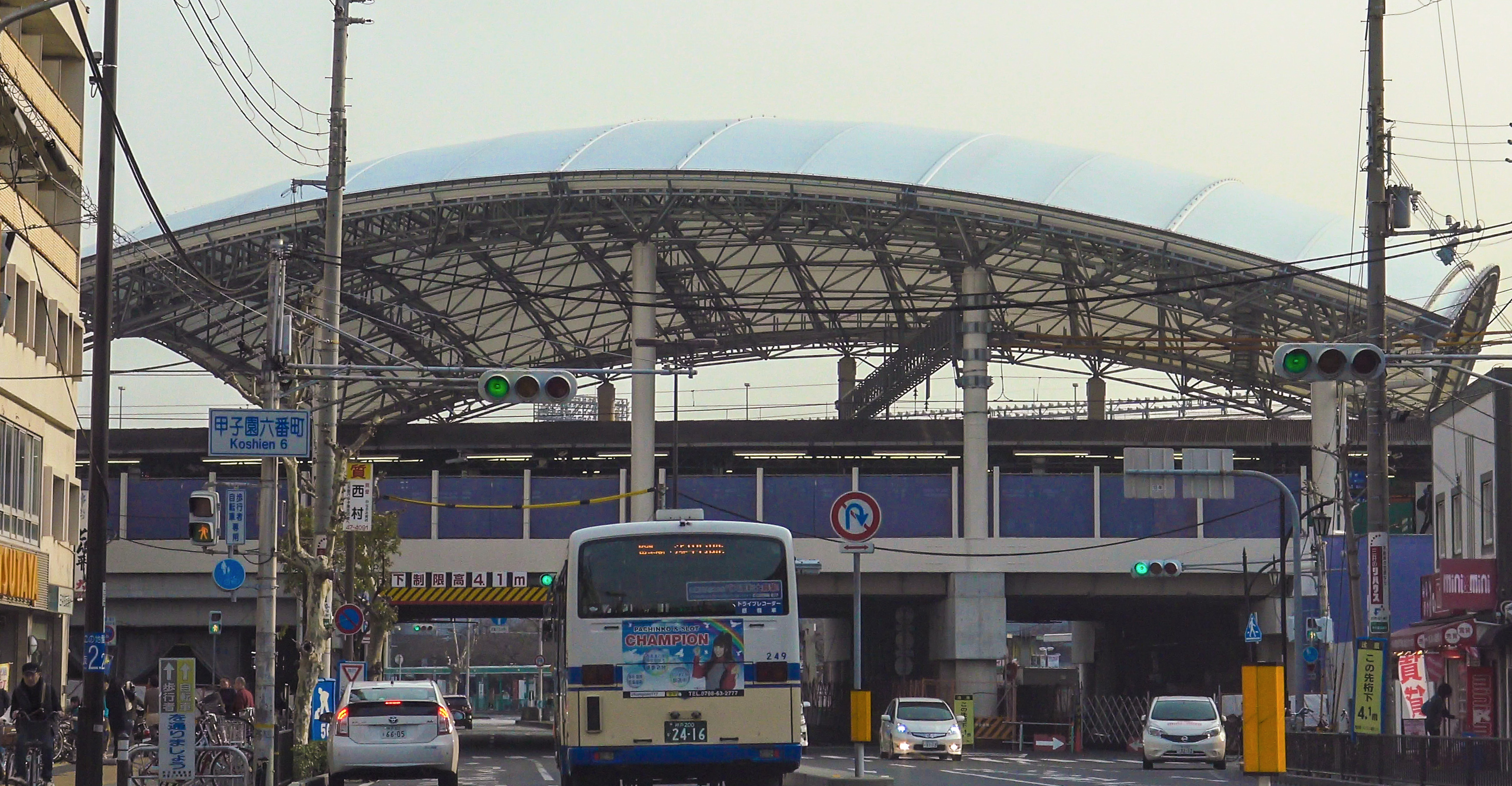 大屋根が設置された、改修中の甲子園駅 （2015年3月、マイカー車内より）